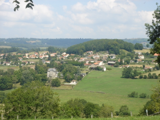 Village de Reilhac, vue de Gabre